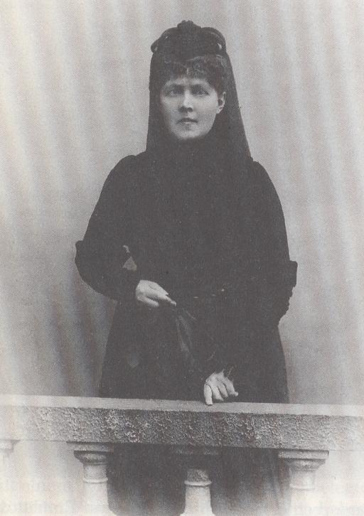 Photography of Elisabeth Förster-Nietzsche